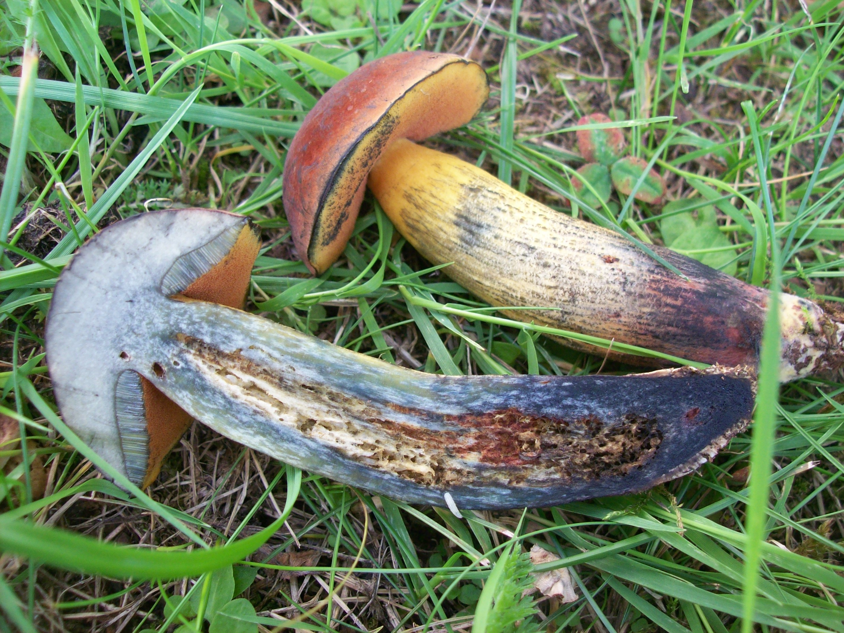 Glattstieliger Hexenröhrling (Suillellus queletii) jung, Schnitt